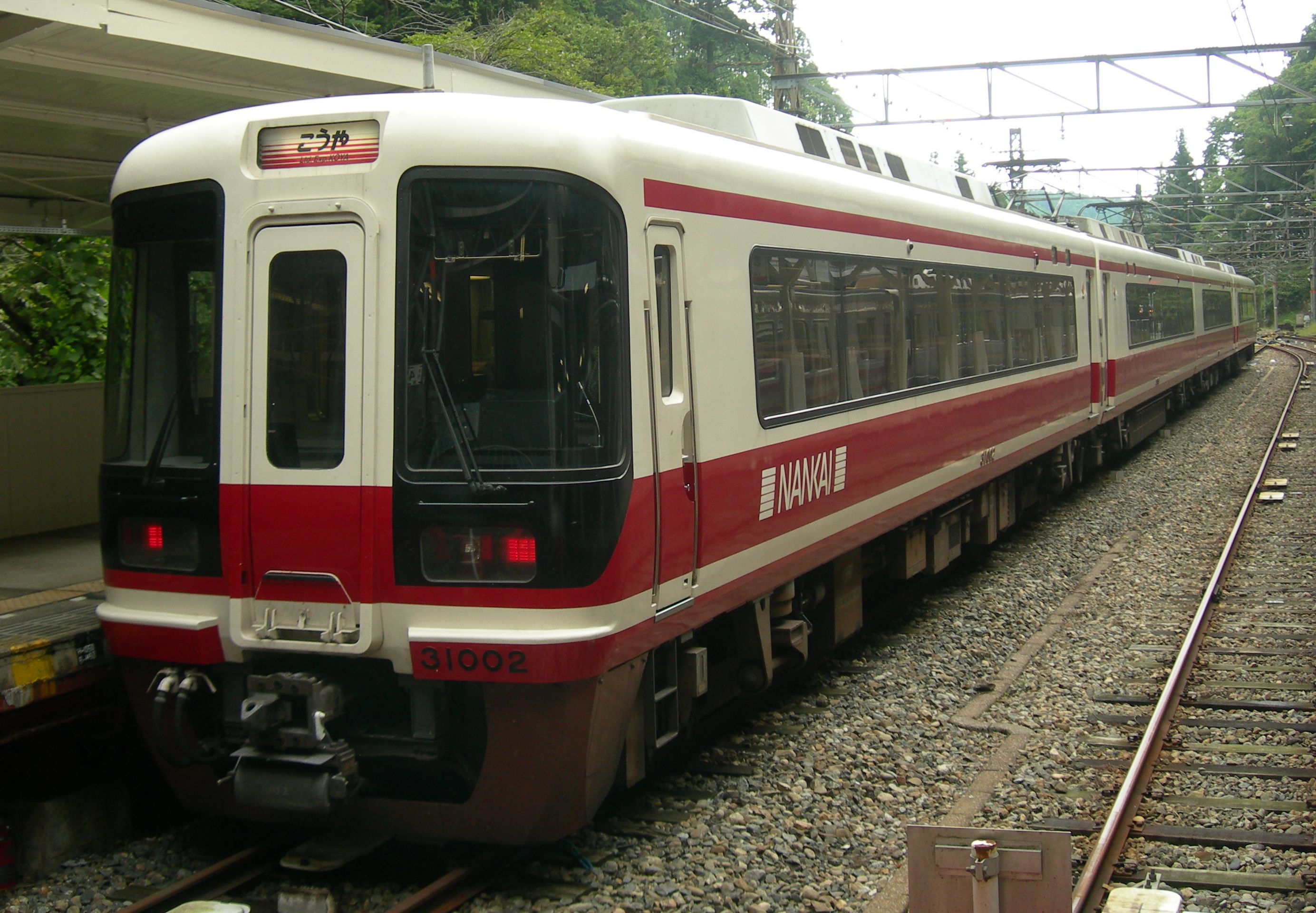 南海31000系電車